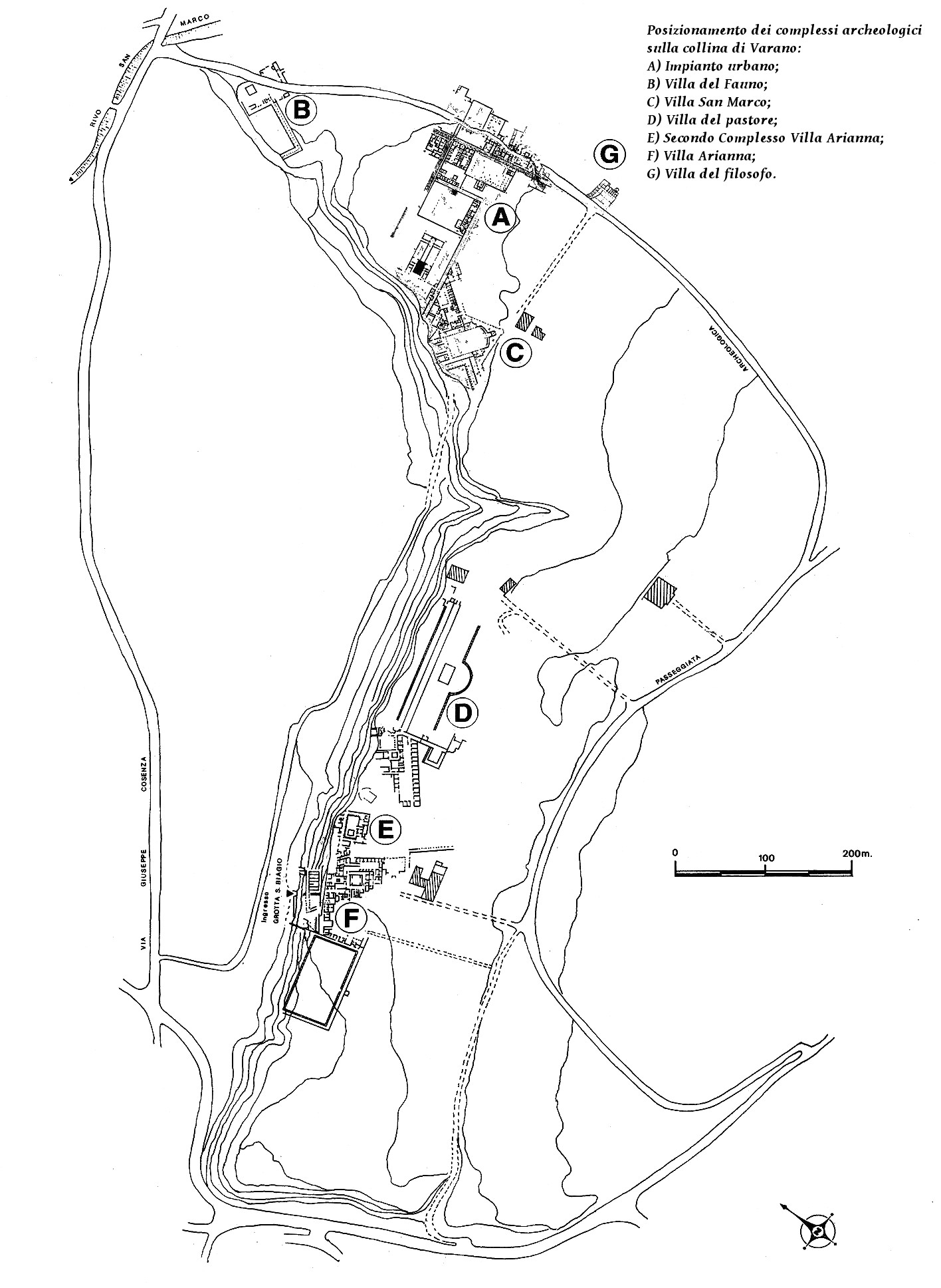 Mappa degli scavi di Stabia